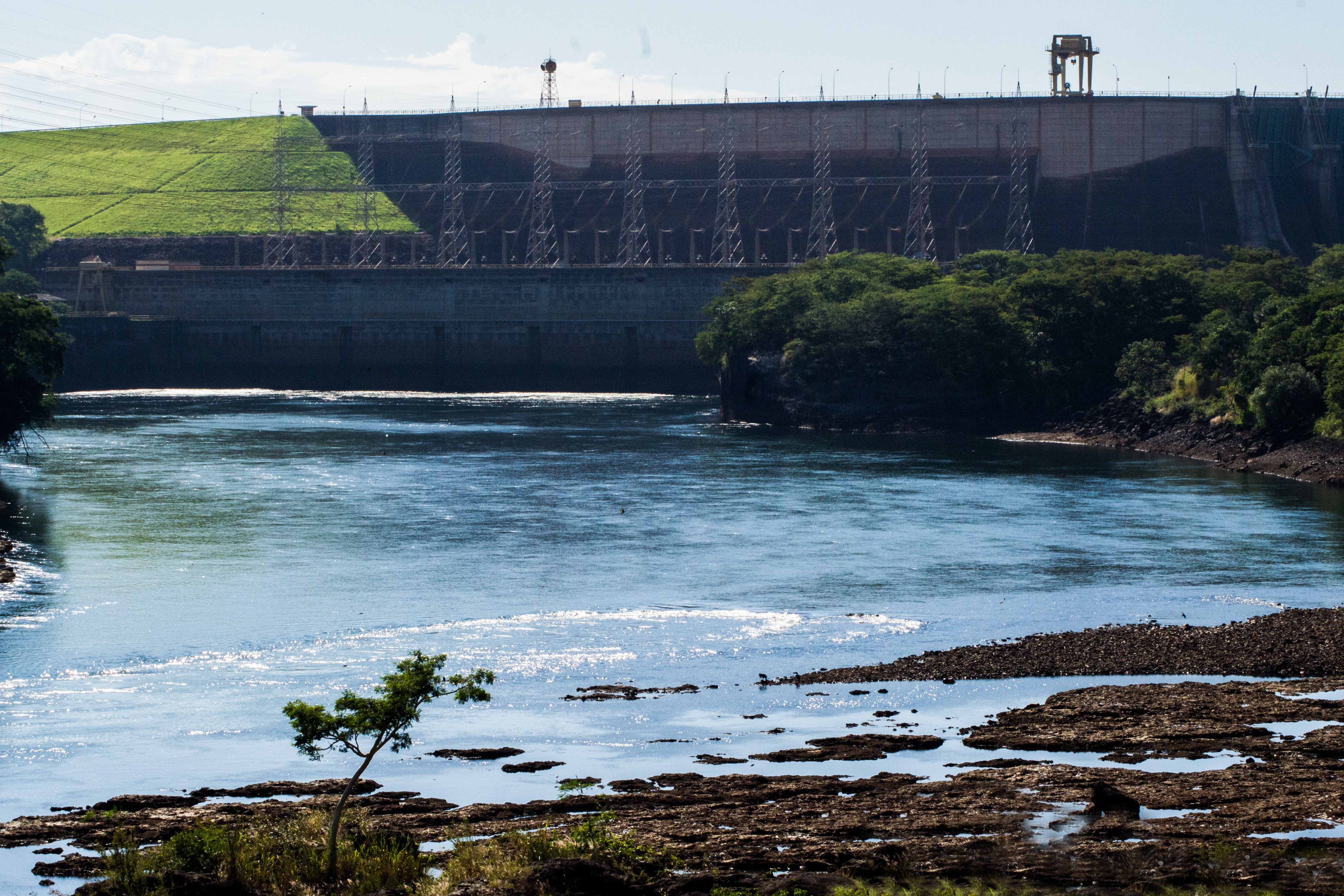 Usina de Marimbondo no Rio Grande